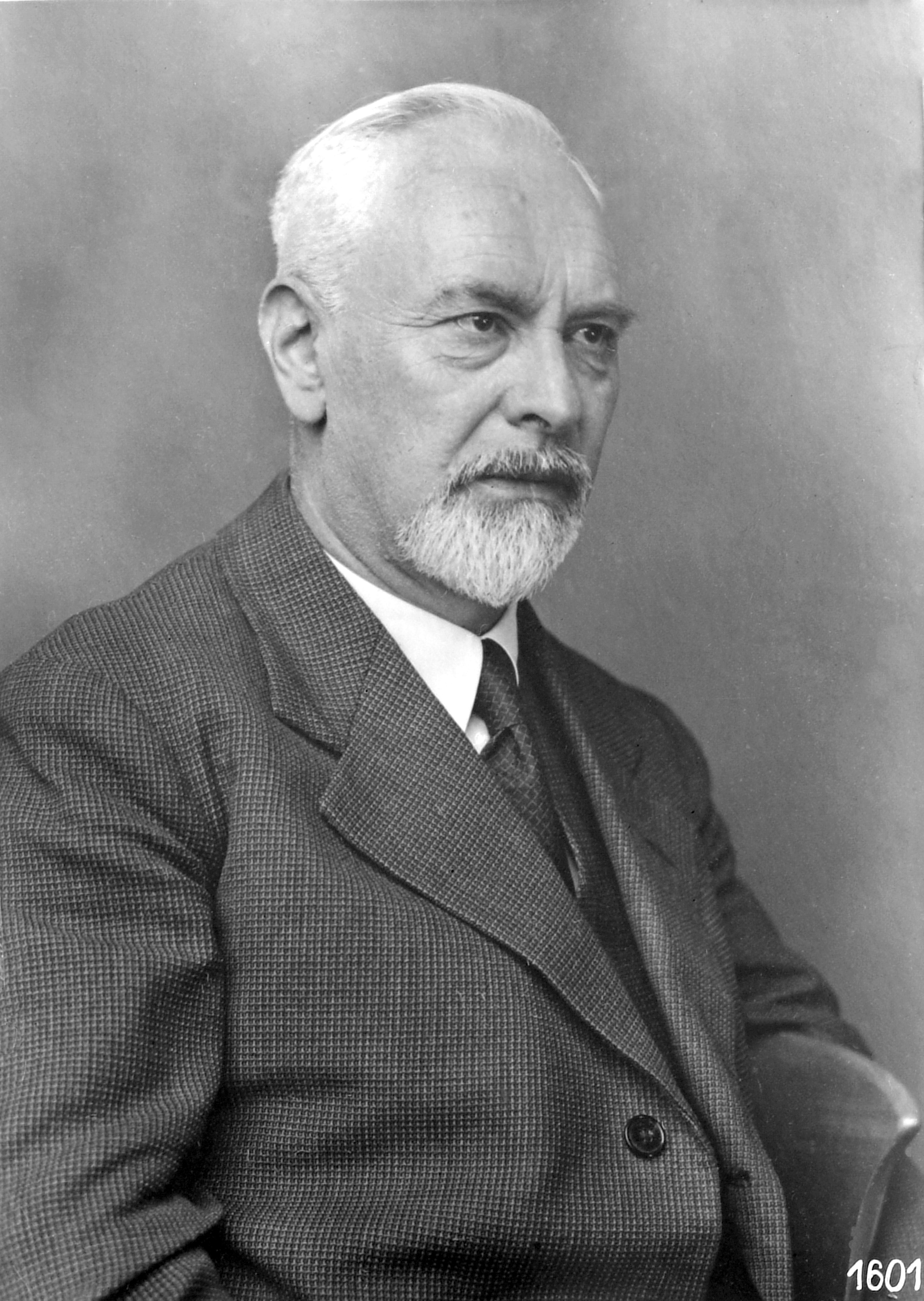 Portraitaufnahme von Ludwig Prandtl (1937).